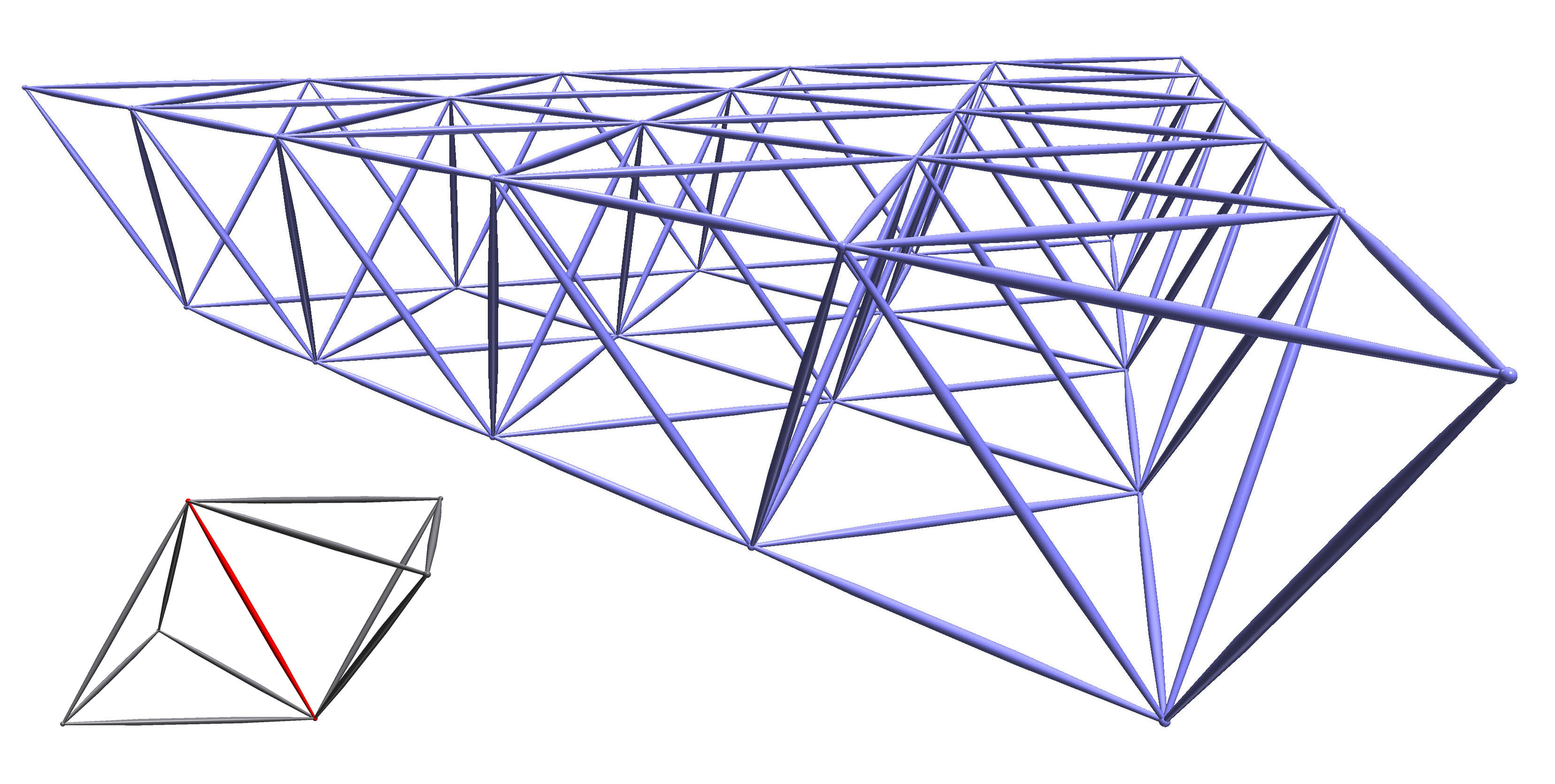 CAD-Skizze, Tetraeder - Raumfachwerk